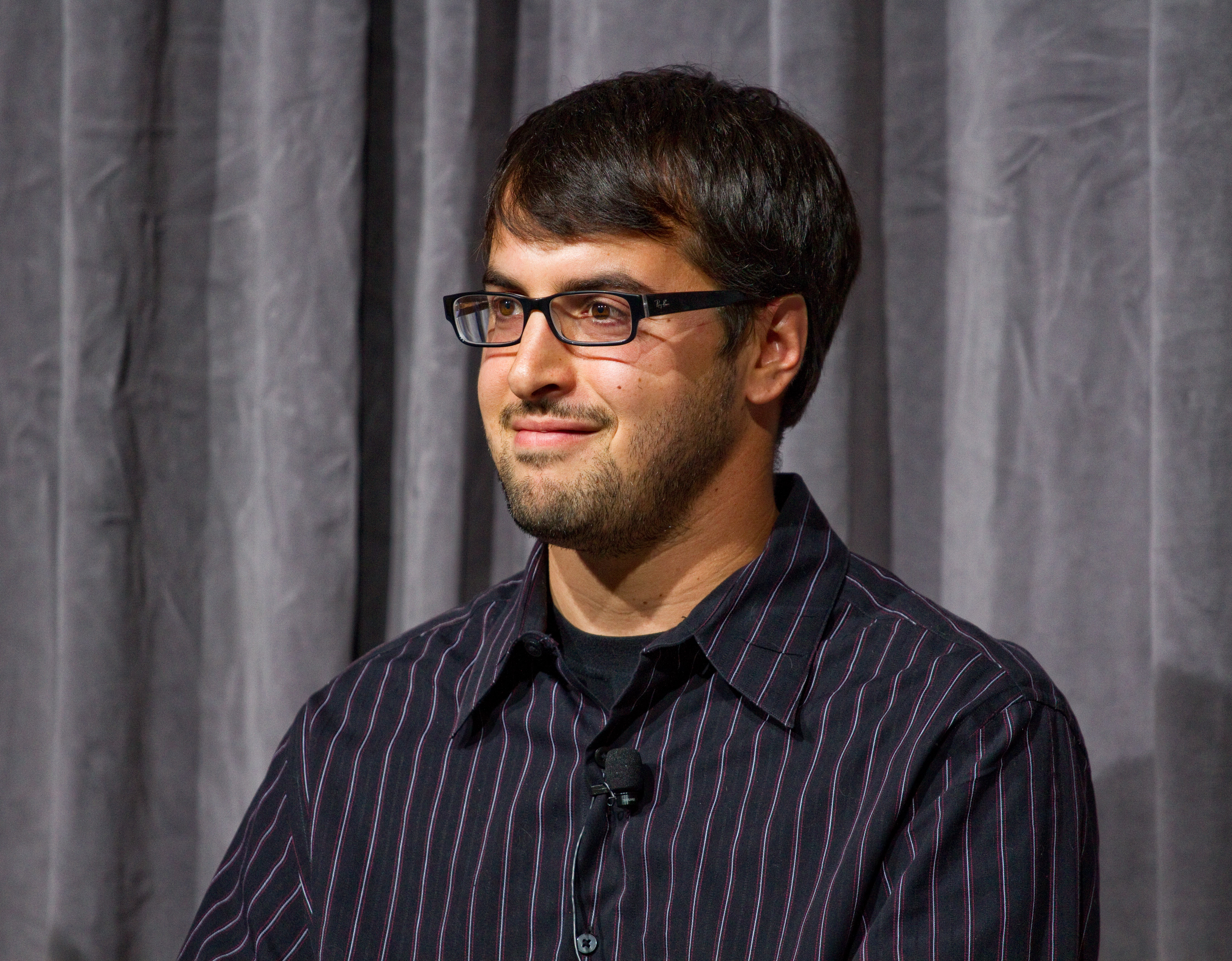 Joe Hewitt